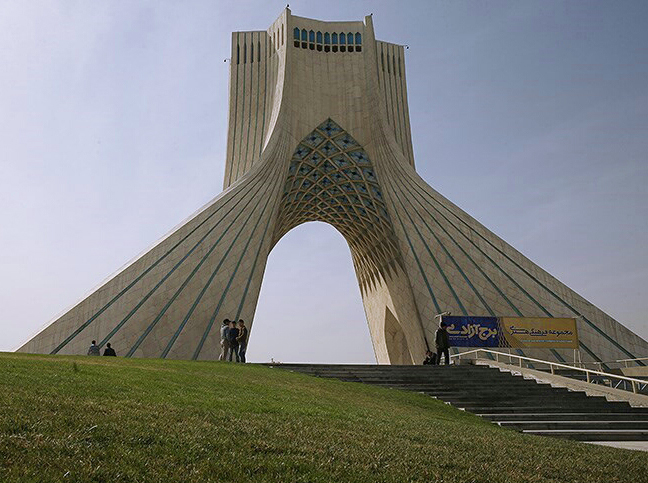 نمایی از برج آزادی و ورودی مجموعه فرهنگی هنری برج آزادی در سمت راست - ۱۳۹۲